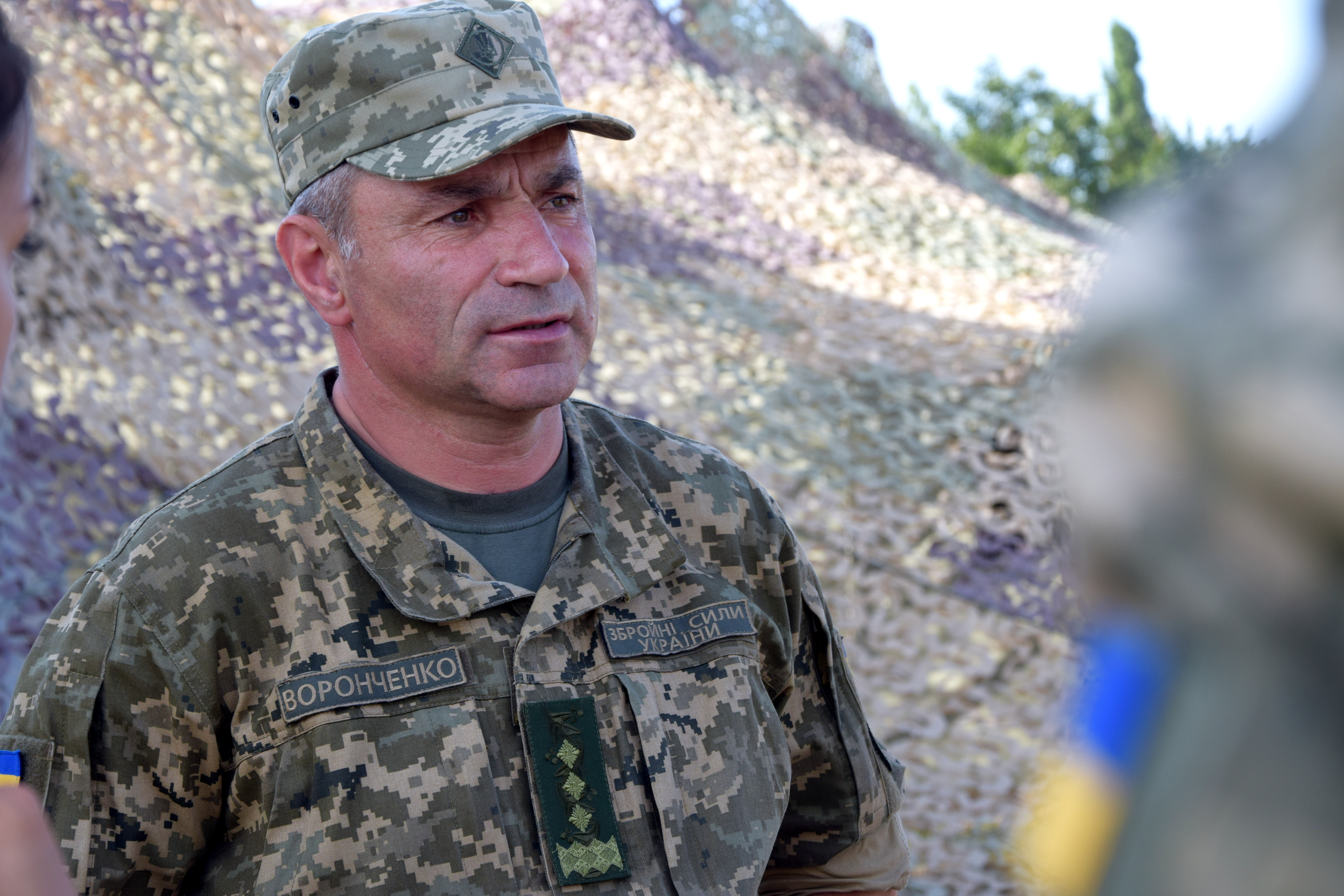 Навчання командування ВМС ЗС України «Шторм – 2018»: дії артилерії, авіації та інженерних підрозділів під час оборони морського узбережжя В рамках спільного командно-штабного навчання Командування Військово-Морських Сил ЗС України з іншими військовими формуваннями та правоохоронними органами “Шторм 18” було проведено операцію щодо оборони морського узбережжя. Окремий артилерійський дивізіон національних ВМС здійснив вогневе ураження морських цілей артилерійськими системами гаубичного типу Д-20. Інженерні підрозділи виконали завдання з облаштування протидесантних мінних загороджень та аерозольного маскування вогневих позицій, а морська авіація виконала бомбометання. Варто зазначити, що злагоджені дії задіяних військ (сил) показали налагоджену роботу командного пункту управління навчання та підвищення взаємосумісності з іншими органами управління. Прес-центр Командування ВМС ЗС України